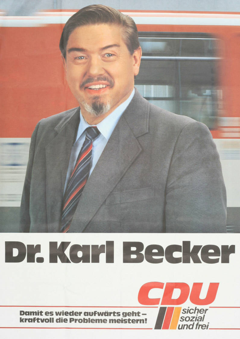 Dr. Karl Becker Damit es wieder aufwärts geht - kraftvoll die Probleme meistern! CDU sicher sozial und freiAbbildung:FotoPlakatart:Kandidaten-/Personenplakat mit PorträtObjekt-Signatur:10-001: 2667Bestand:Plakate zu Bundestagswahlen (10-001)GliederungBestand10-18:Plakate zu Bundestagswahlen (10-001) » Die 10. Bundestagswahl am 6. März 1983 » CDU » Mit PorträtfotoLizenz:KAS/ACDP 10-001: 2667 CC-BY-SA 3.0 DE